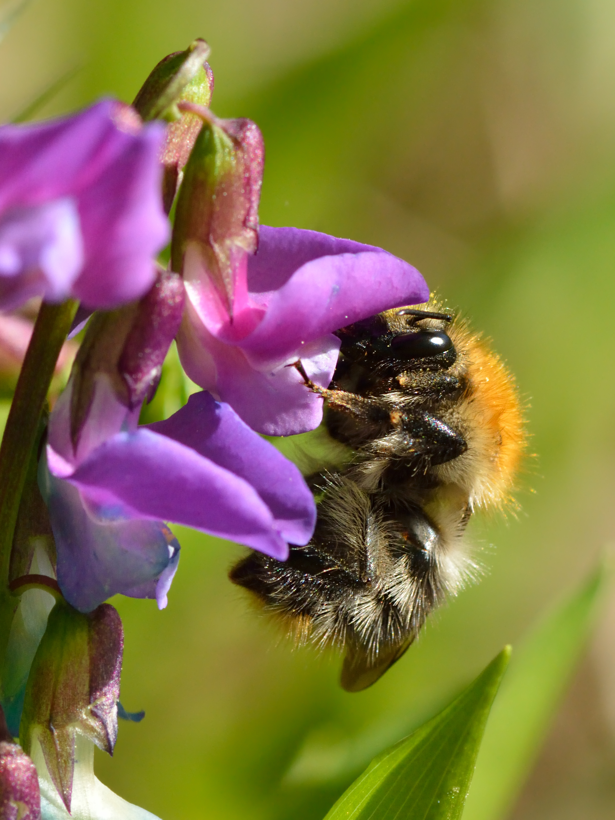 Põldkimalane kevadisel seahernel. Keila, Loode-Eesti.